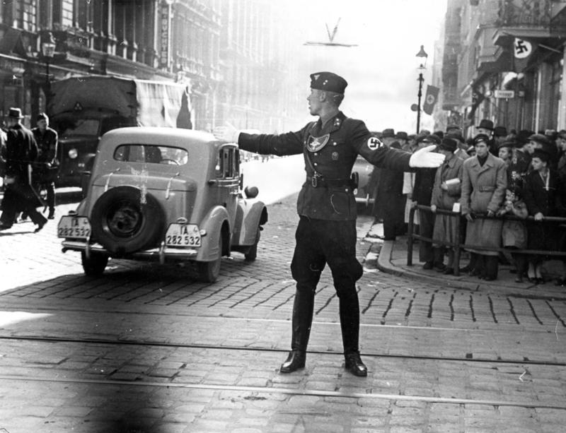 Posen, Regelung des Verkehrs durch NSKK Im deutschen Posen. In der nach 20jähriger Fremdherrschaft befreiten Stadt hat das tägliche Leben wieder sein normales Gesicht angenommen. In den Strassen und auf den Plätzen ergiesst sich ein lebhafter Fahrzeug- und Personenverkehr. Läden und Gaststätten weisen einen guten Besuch auf. U.B.z. NSKK-Männer sind zur Regelung des sehr starken Strassenverkehrs eingesetzt. Fot. Ho. 17.10.39 12430-39